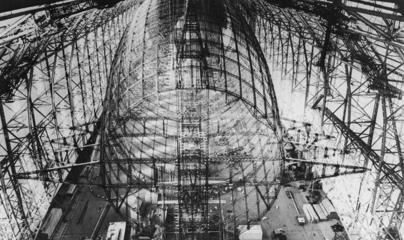 "L.Z. 129", das neue deutsche Luftschiff, im Bau auf der Werft der Luftschiffbau Zeppelin Gmbh Friedrichshafen. Das Stahlgerippe.